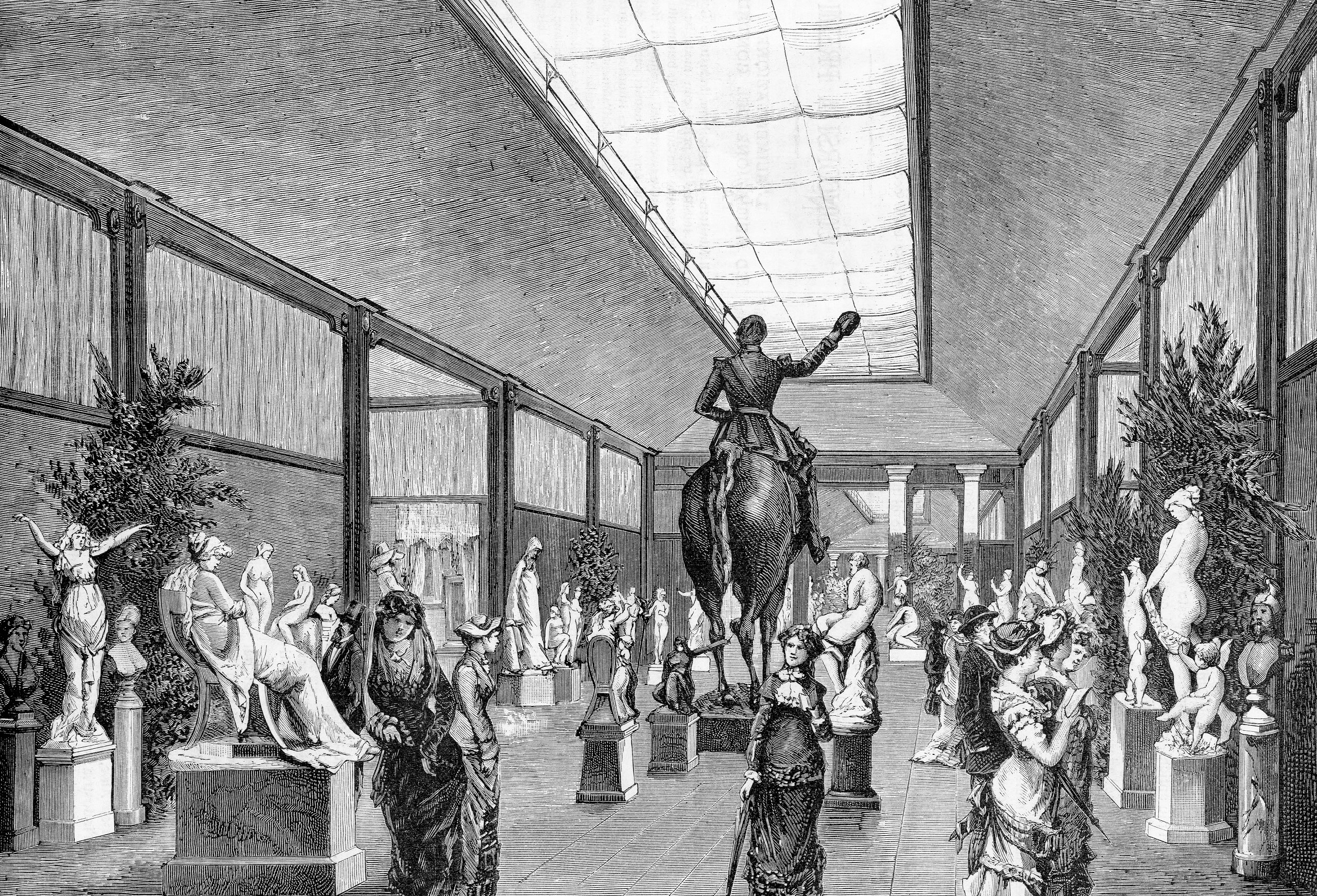 Galleria centrale della Scultura nel palazzo dell'Esposizione di Belle Arti